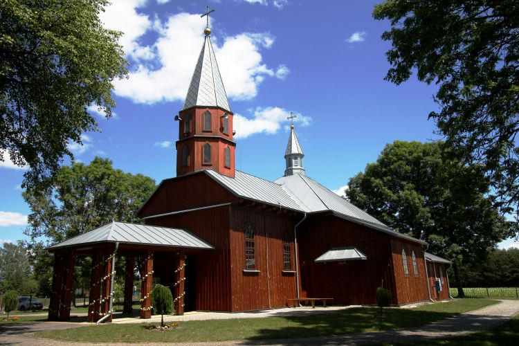 Kościół parafialny w Lipinach Górnych Borowina. Fot. ks. Jacek Rak